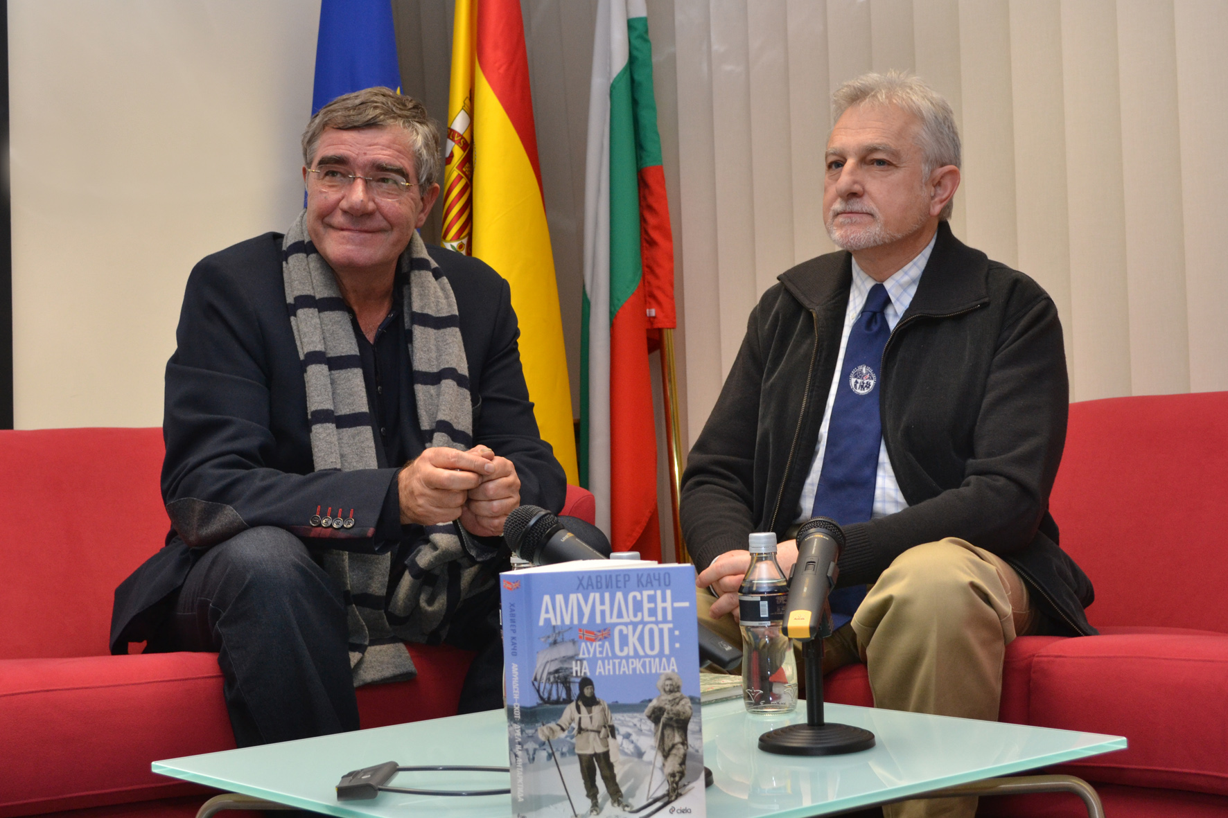 Хавиер Качо и проф. Христо Пимпирев на премиерата на "Амундсен-Скот" в Институт Сервантес-София, 5 декември 2012 г.